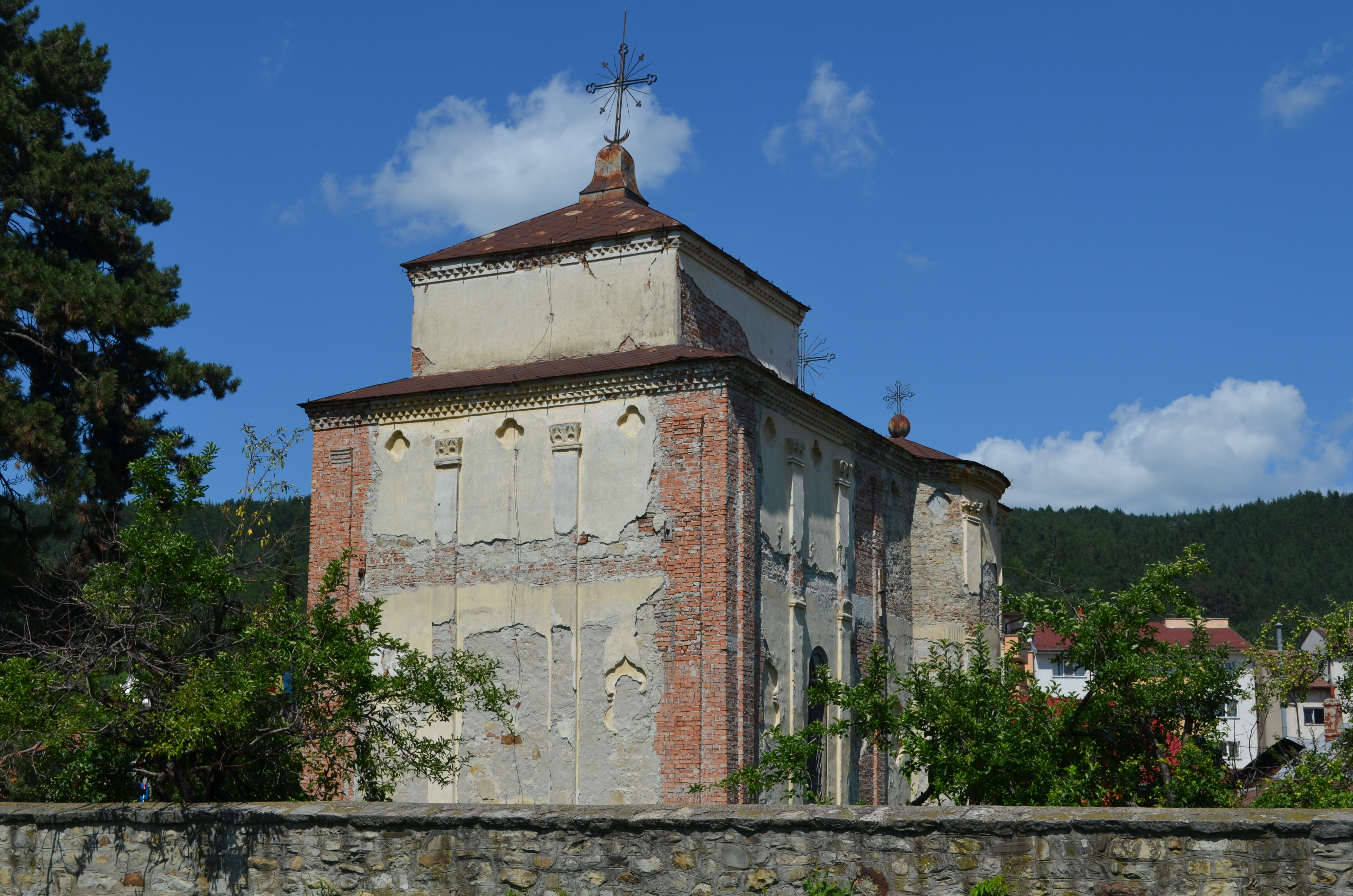 Biserica "Sfântul Nicolae" din Târgu Ocna 01